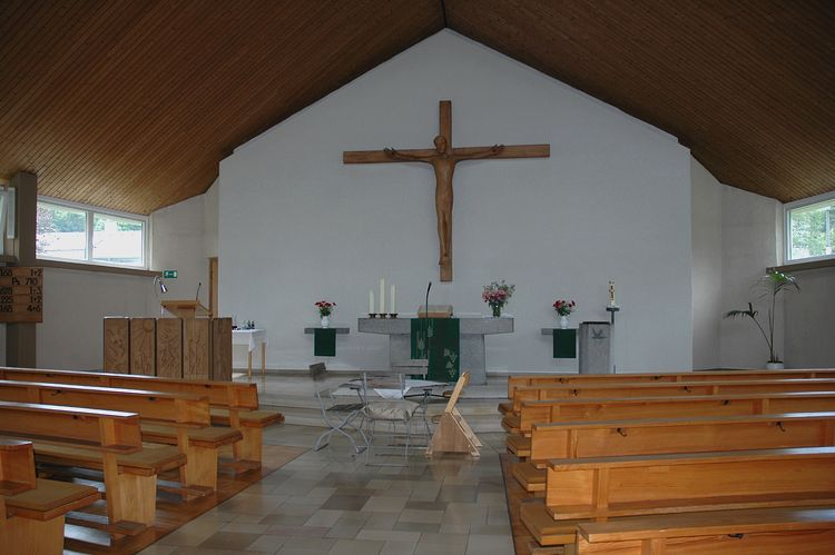 Blick in das Innere der evangelischen Markuskirche in Jestetten mit einem Altarkreuz von Siegfried Fricker.